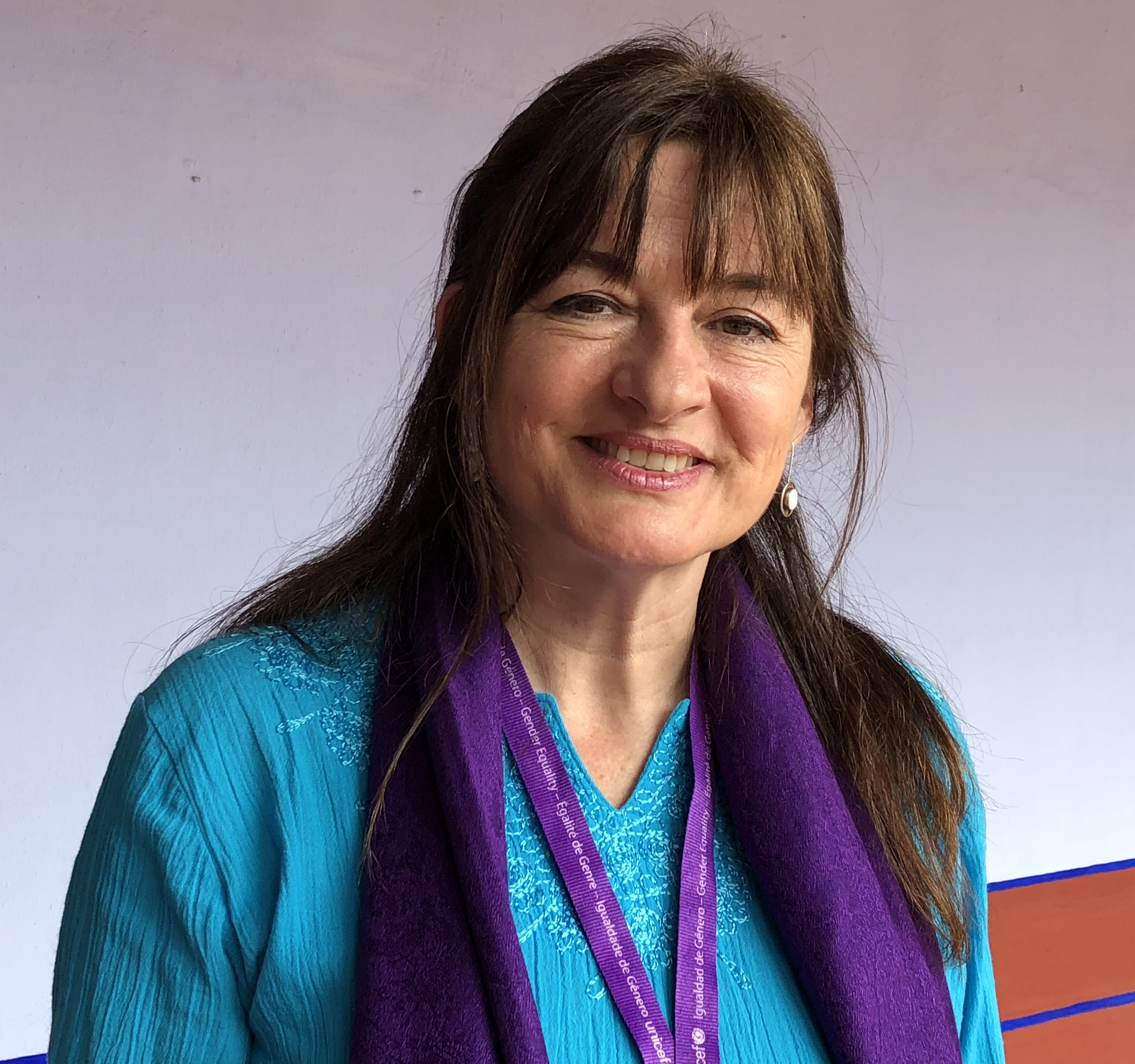 Reunión de UNICEF en Guatemala